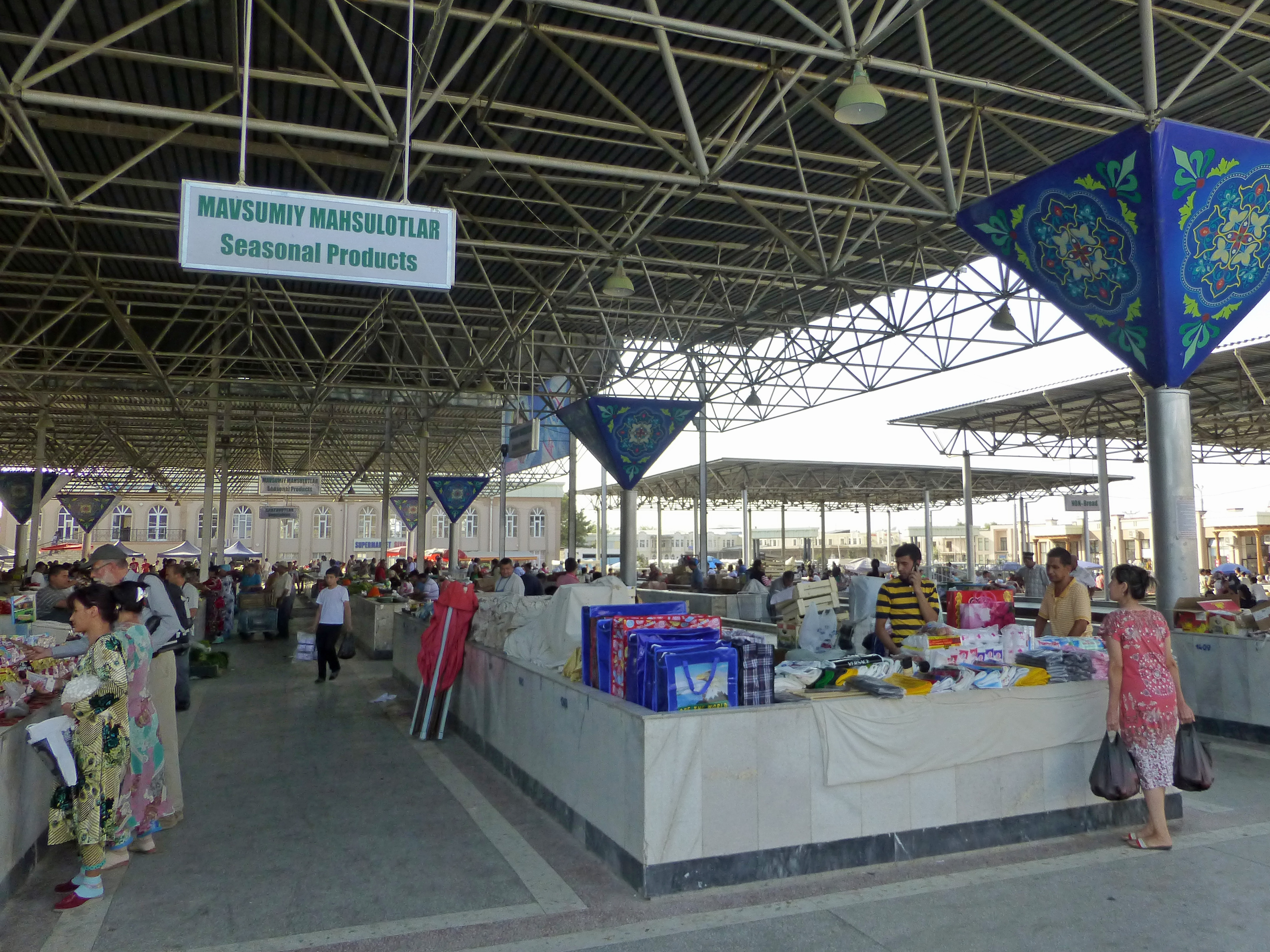 Siyob Bazaar, le grand marché de Samarcande (Ouzbékistan)